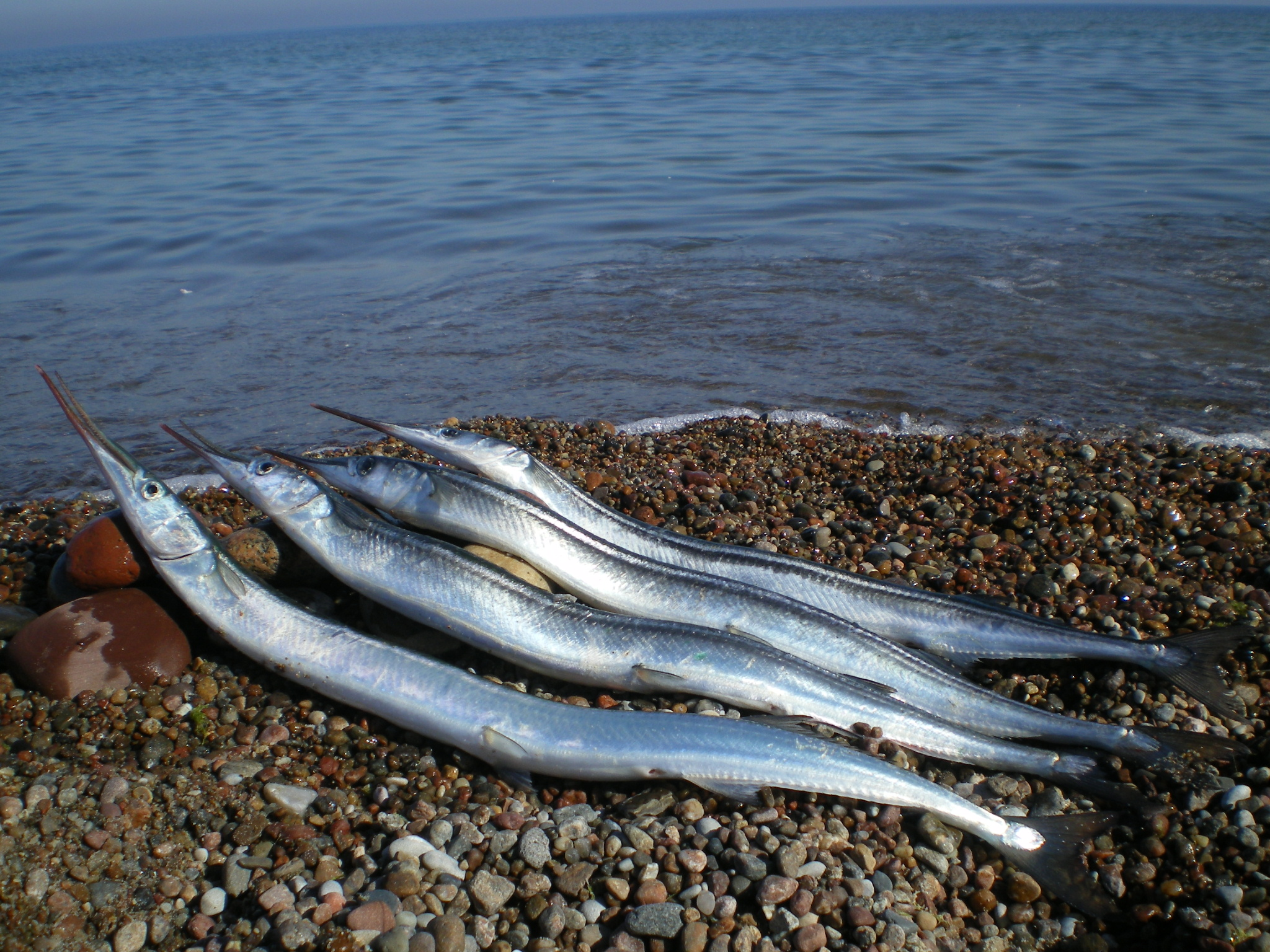 Belona pospolita (belone belone)